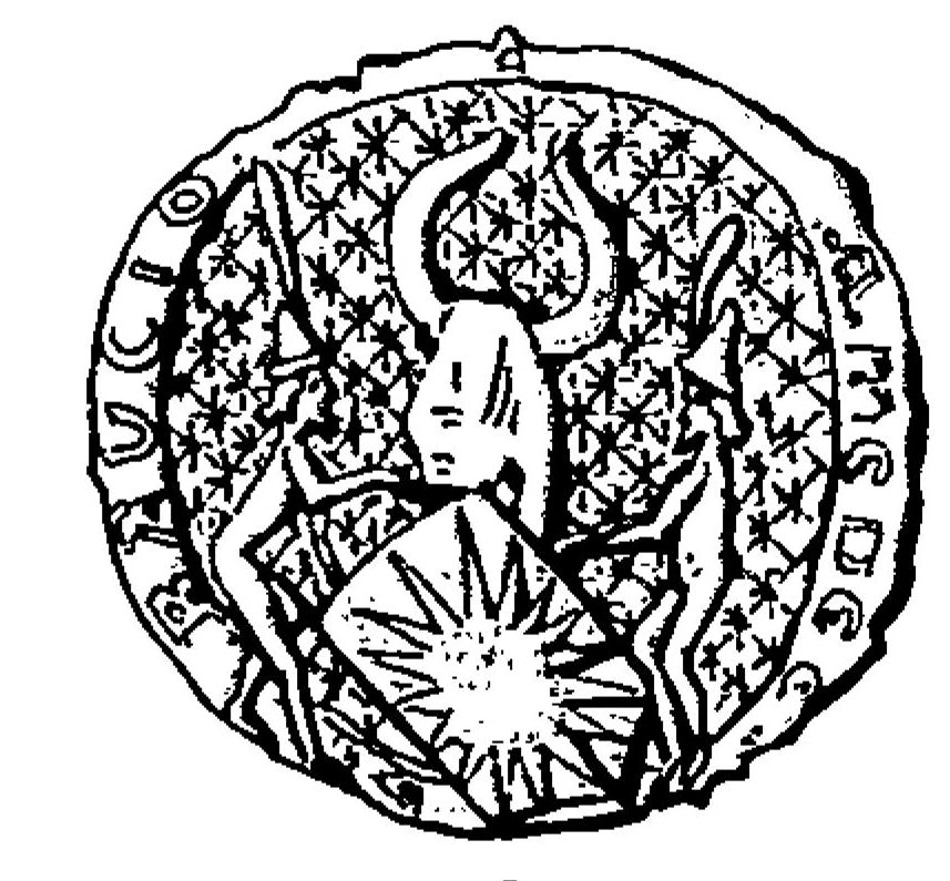 Sceau d'Amiel des Baux